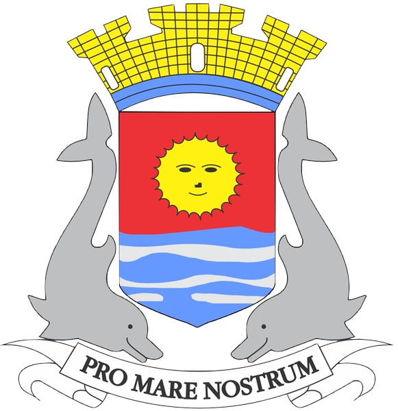 Brasão do Município da Estância Balneária do Guarujá.